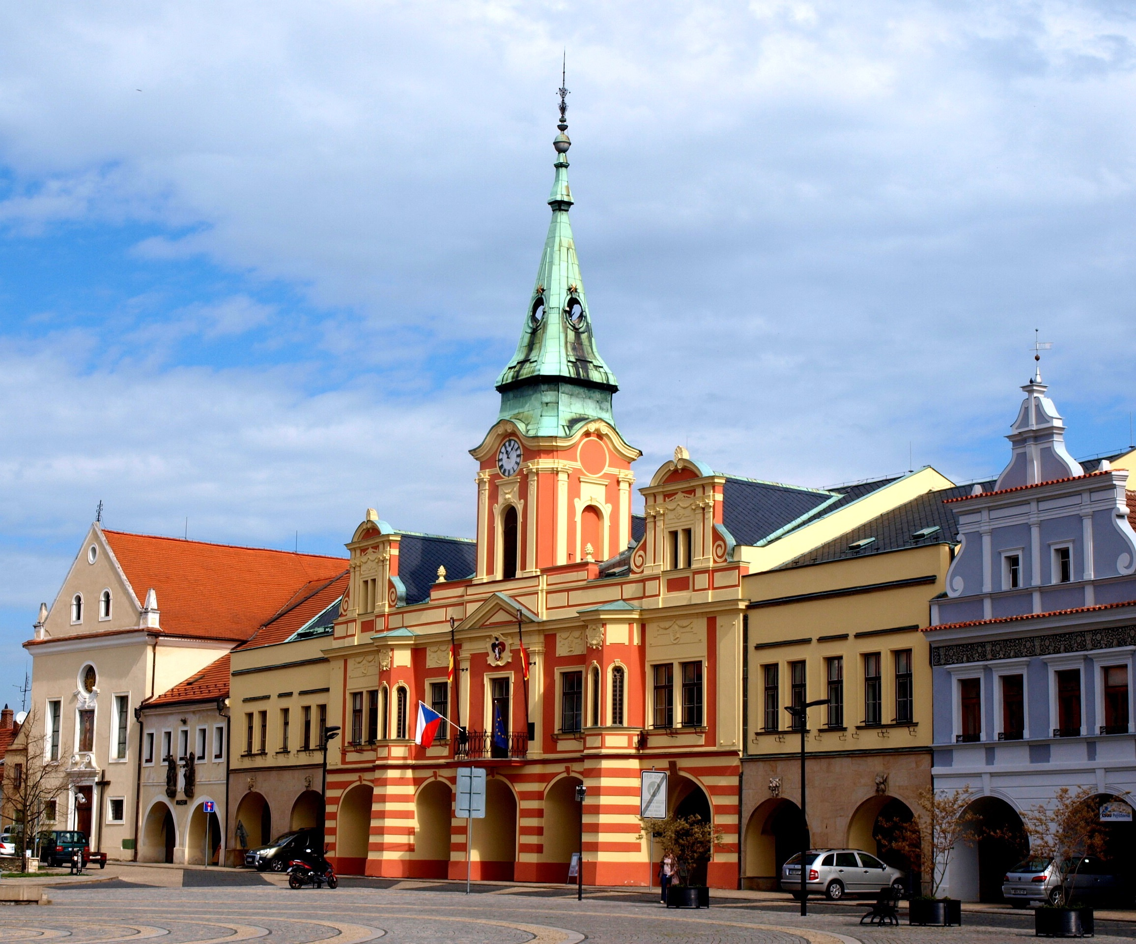 Mělník náměstí